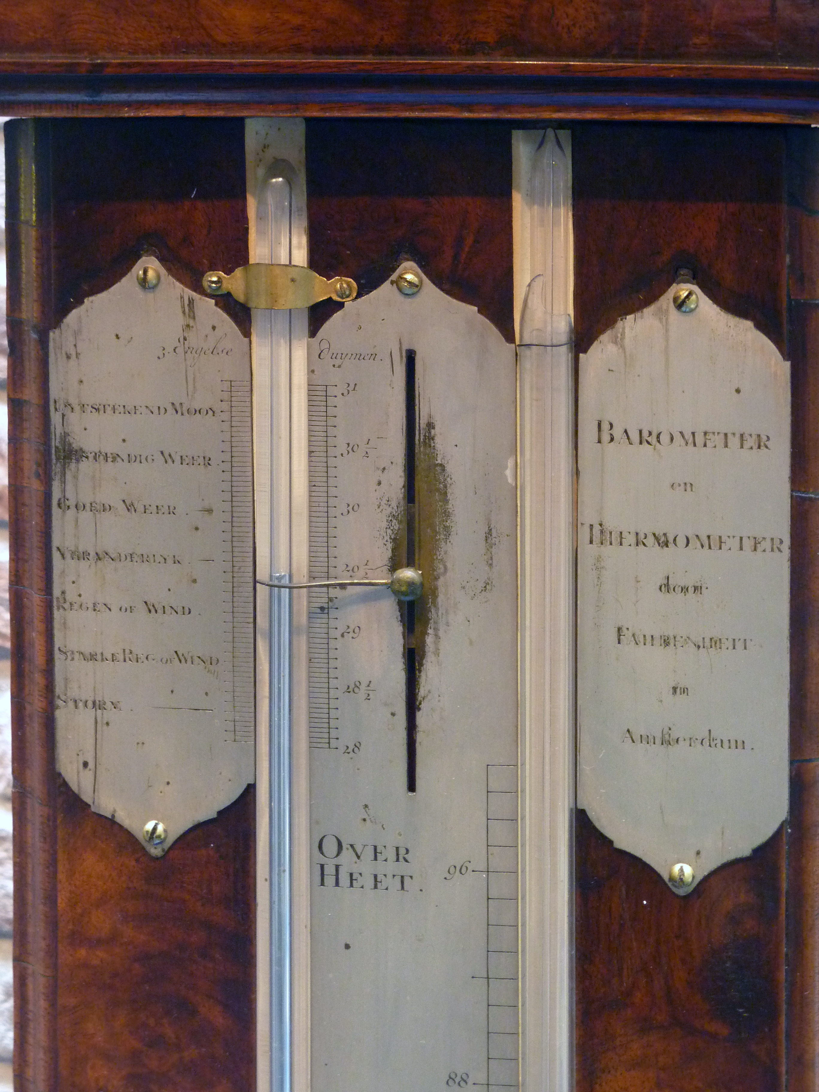 Museum Boerhaave, Leiden - Fahrenheit thermo barometer.jpg